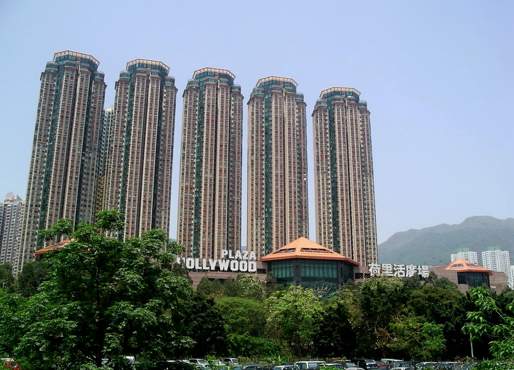 Galaxia, Kowloon, Hong Kong